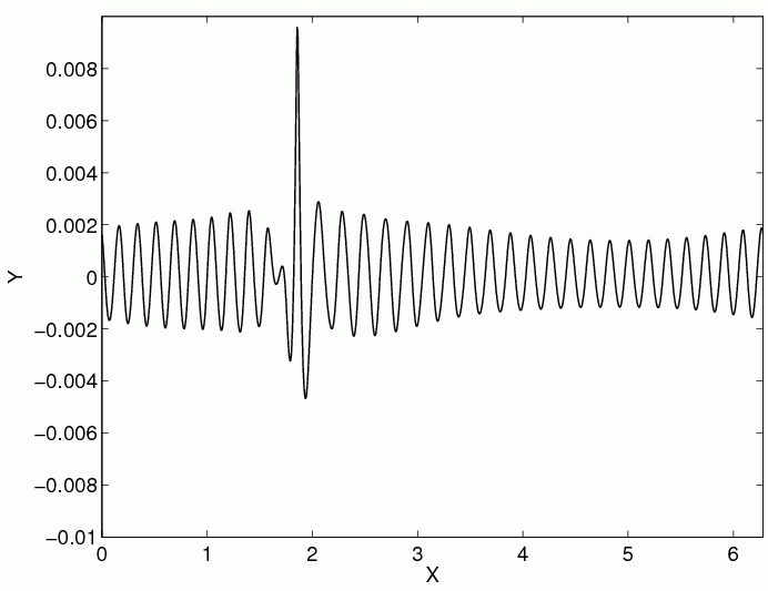 Численное моделирование волны-убийцы